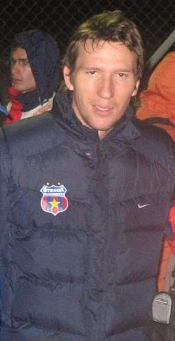 Victoras Iacob